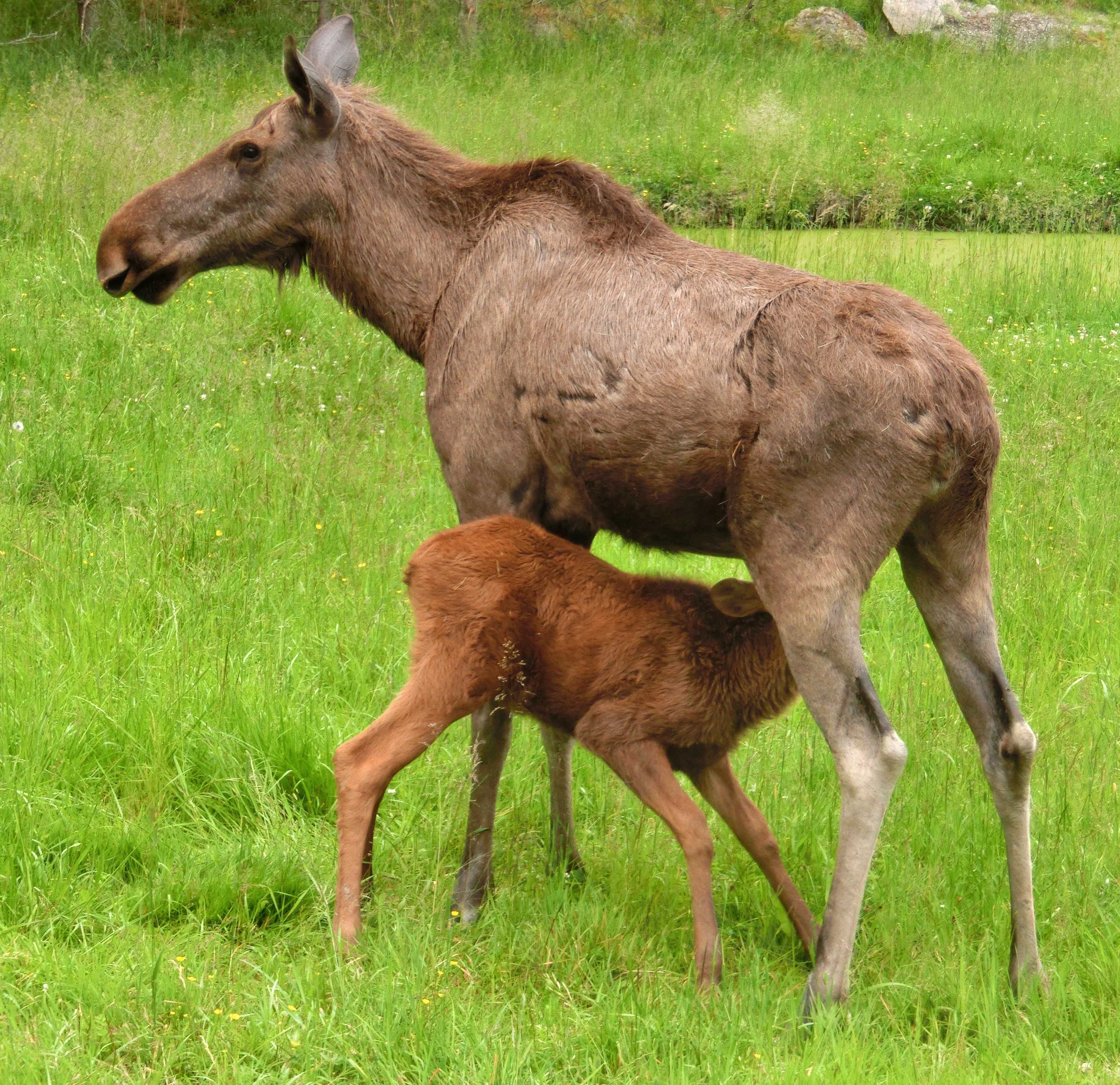 Älgko (Alces alces alces) med diande kalv i Gårdsjö älgpark, Västerlövsta socken, Heby kommun, Uppsala län, Uppland, Sverige. Troligen är detta älgkon Hedvig (född 2007) med kalven Nelly (född 2013).